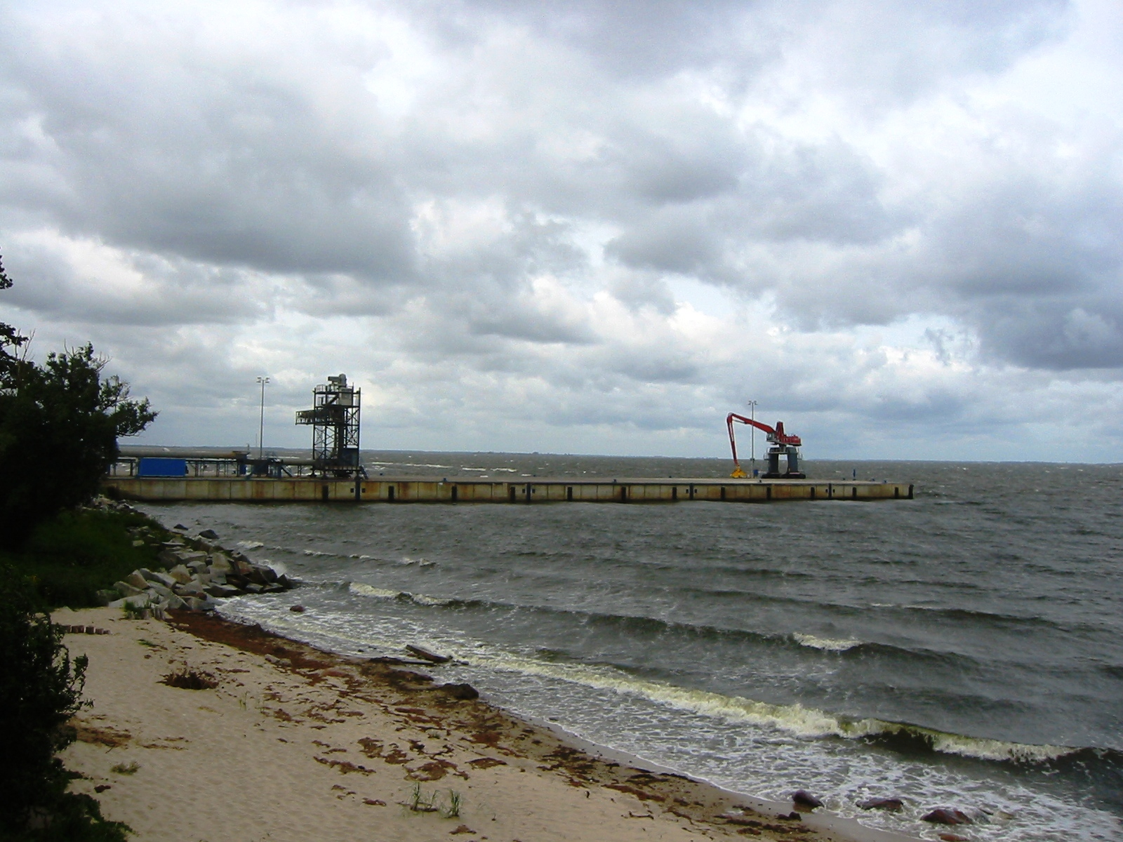 Getreidehafen in Vierow mit Strand, Gemeinde Brünzow, im Landkreis Ostvorpommern